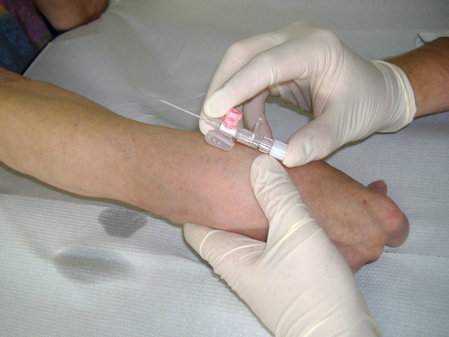 Punktion mit einer Venenverweilkanüle - Punction with an intravenous cannula